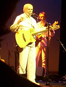 Description : Georges Moustaki en concert au Théâtre du Rond-Point Date : 28 décembre 2005 Auteur : HaguardDuNord